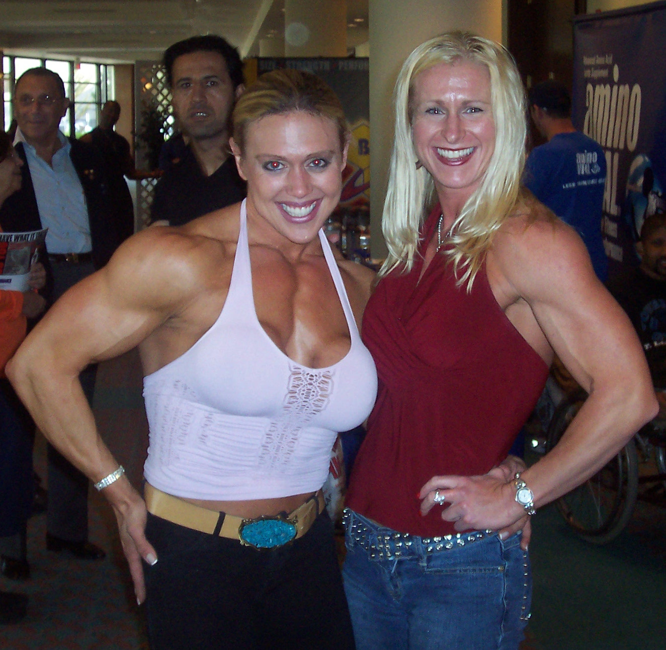 Colette Nelson and Debbie Patton